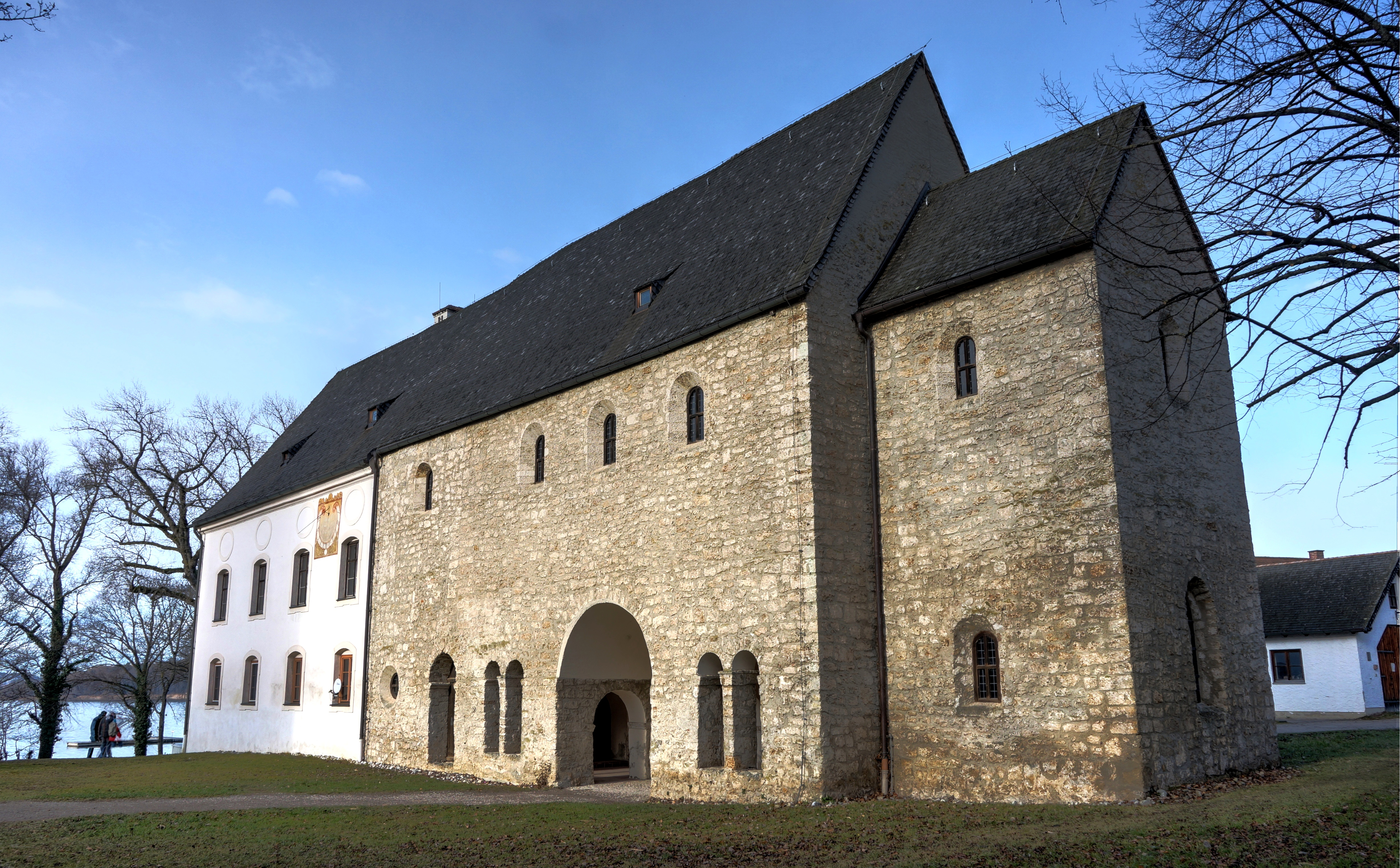 Deutschland, Bayern, Oberbayern, Landkreis Rosenheim, Chiemsee, Fraueninsel, Frauenchiemsee, karolingische Torhalle